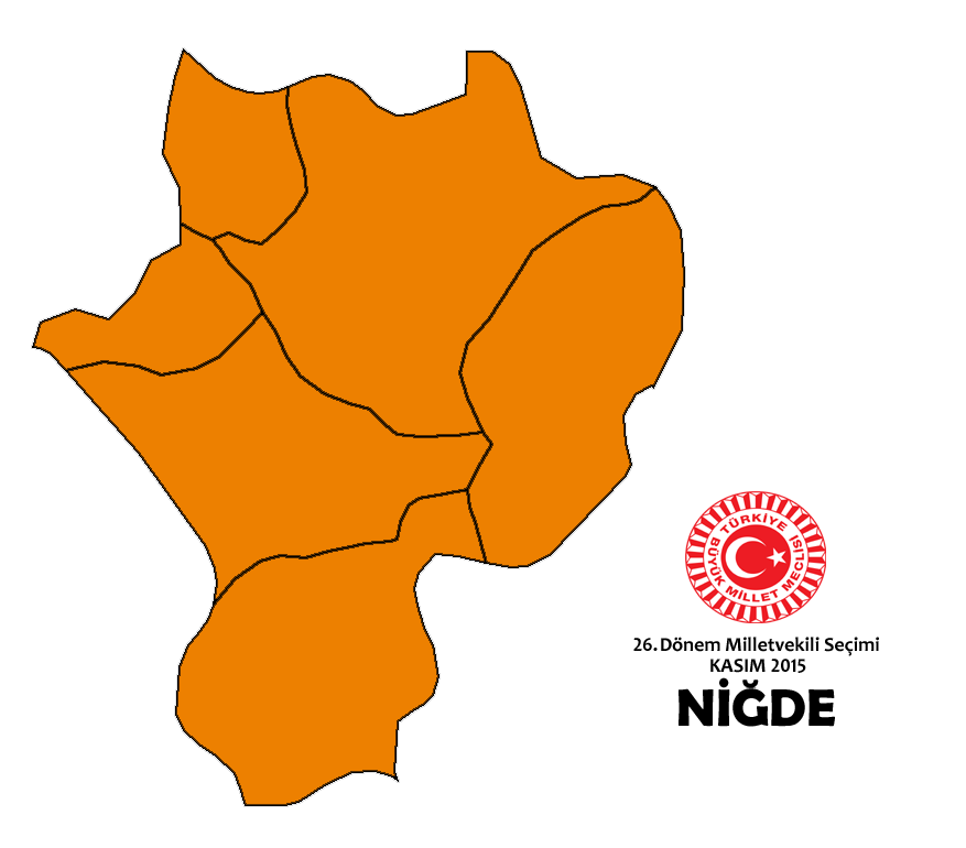 Kasım 2015 Seçimleri